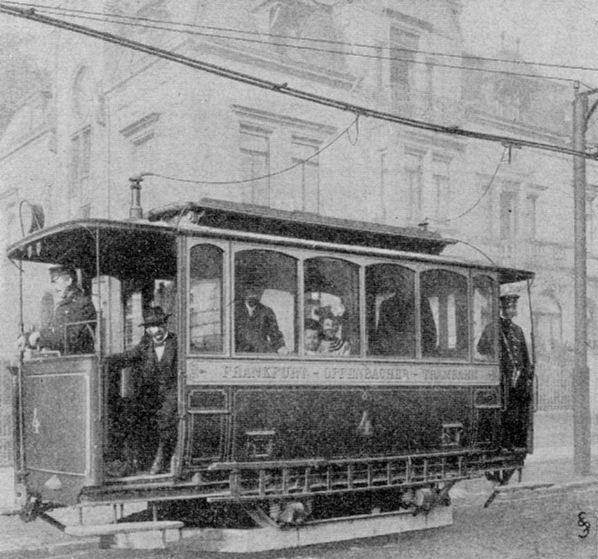 Motorwagen der elektrischen Straßenbahn Frankfurt a. M. - Offenbahn